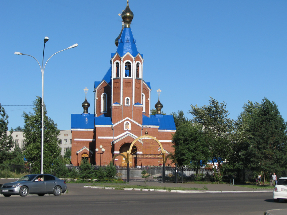 Церковь на проспекте Первостроителей, Комсомольск-на-Амуре